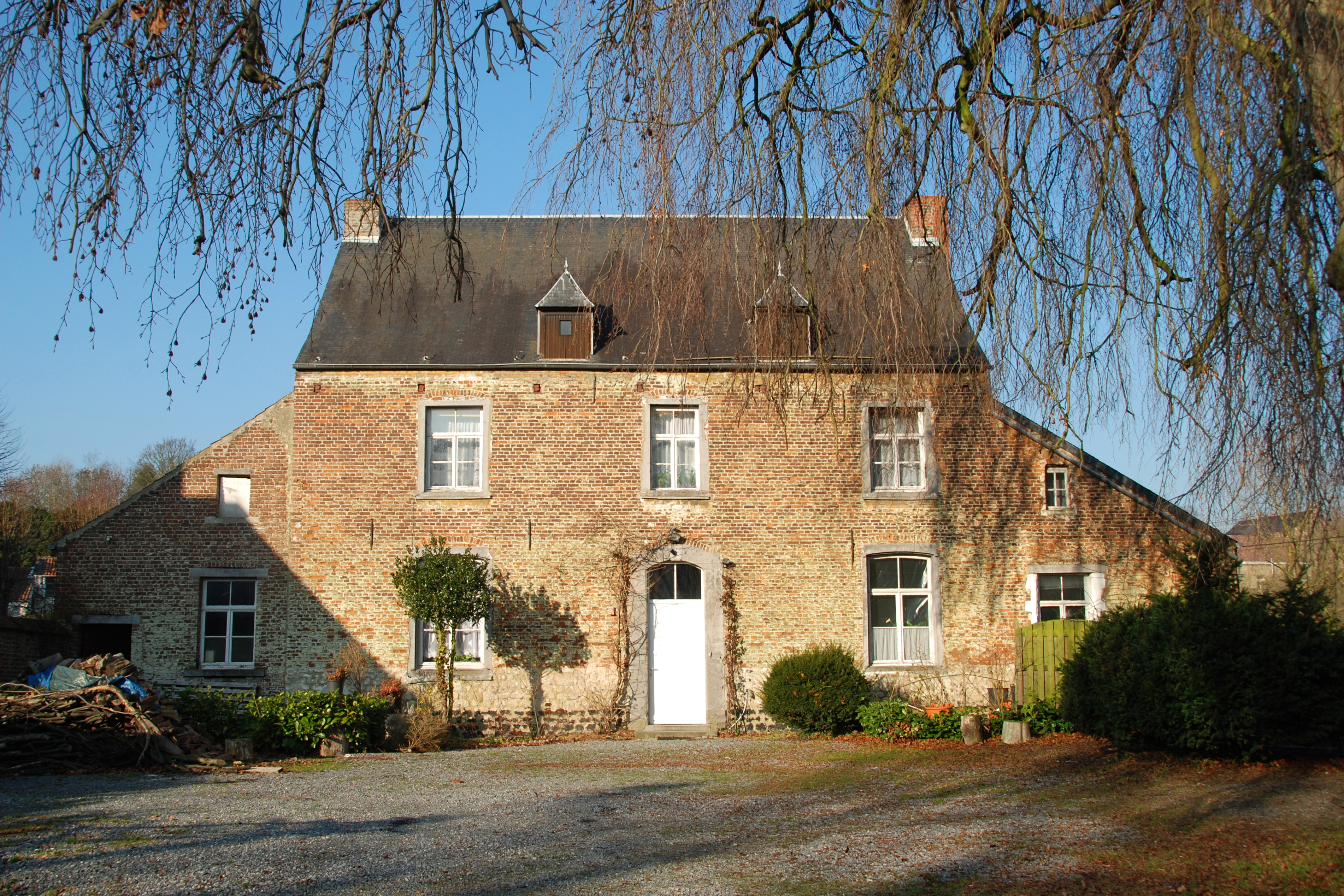 Belgique - Brabant wallon - Ways - Presbytère situé à côté de l'église Saint-Martin